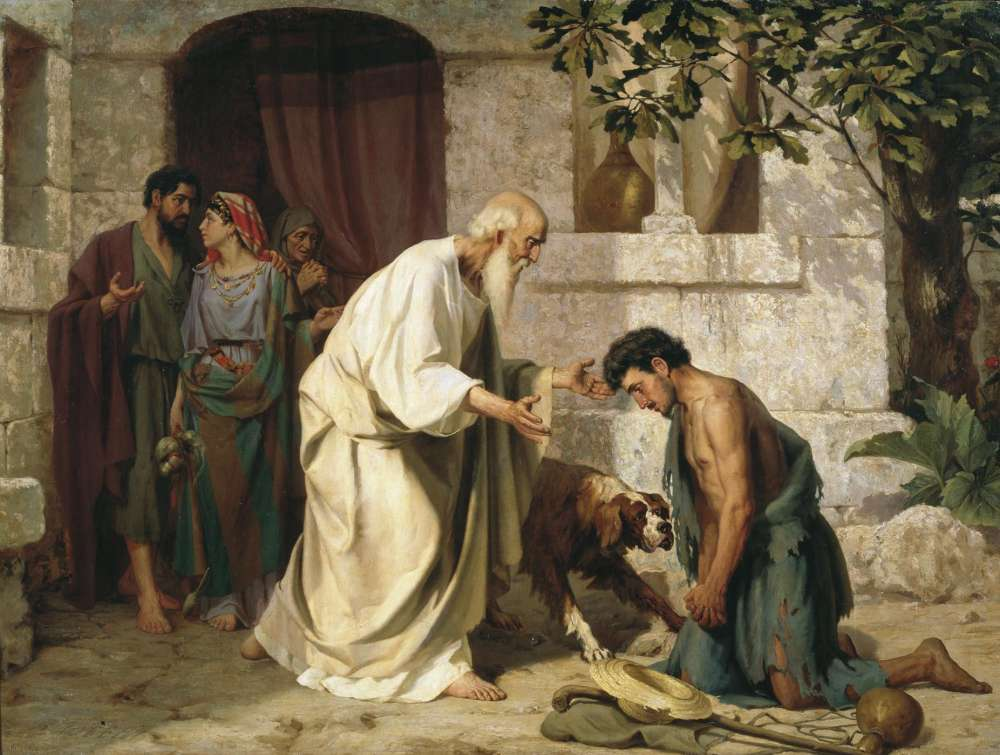 Блудный сын. 1882. Холст, масло